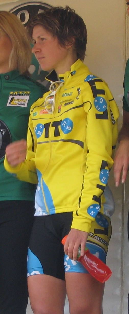 Magdalena Sadłecka - Skoda Auto GP, Gdynia, Poland 2005 Author: Piotr Tysarczyk